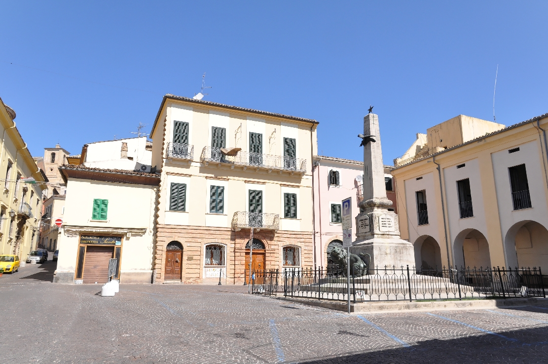 Penne (comune, Italy) 2012